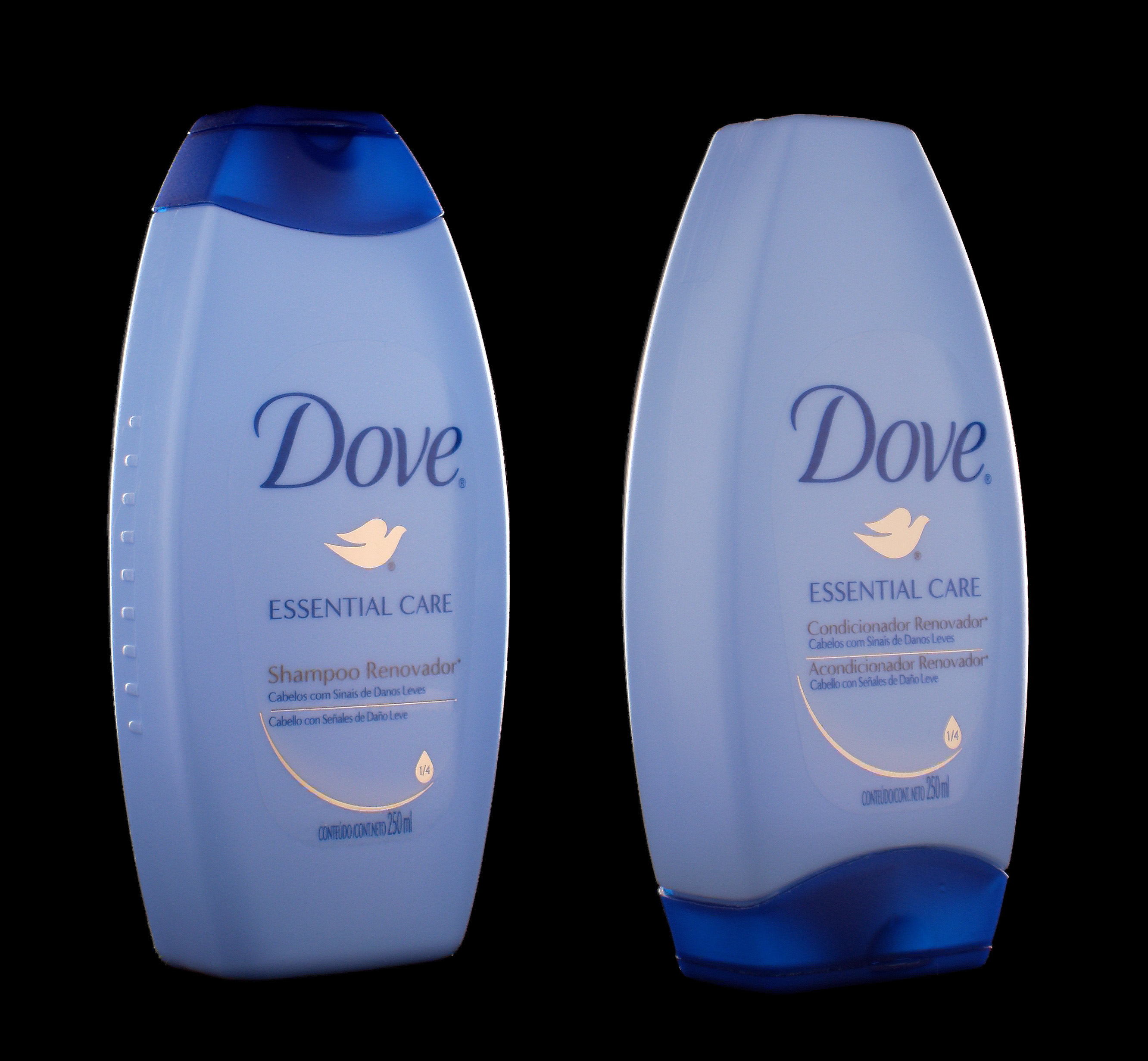 Botella de Champú para el cabello Dove Essential Care, fabricado en Brasil por Unilever.